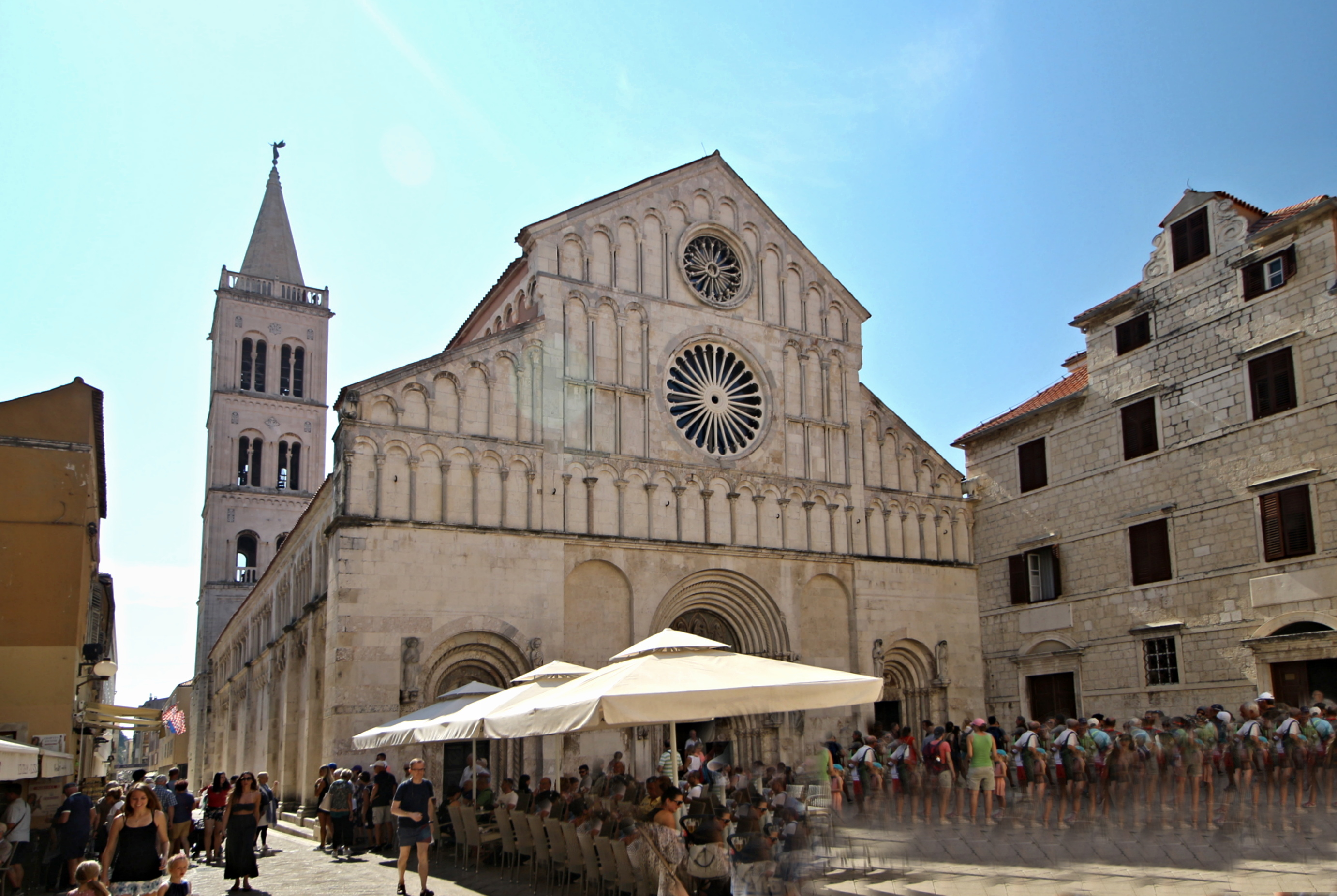 Katedrála svaté Anastázie v Zadaru